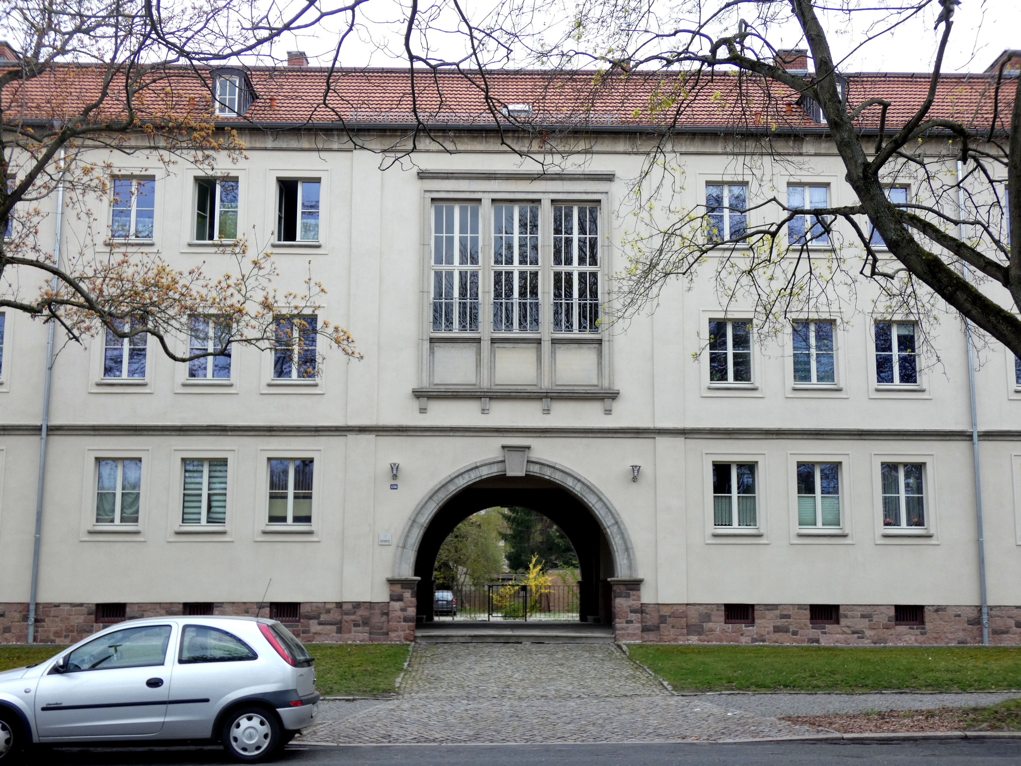 Landrain 130–139, Siedlung, Halle (Saale)